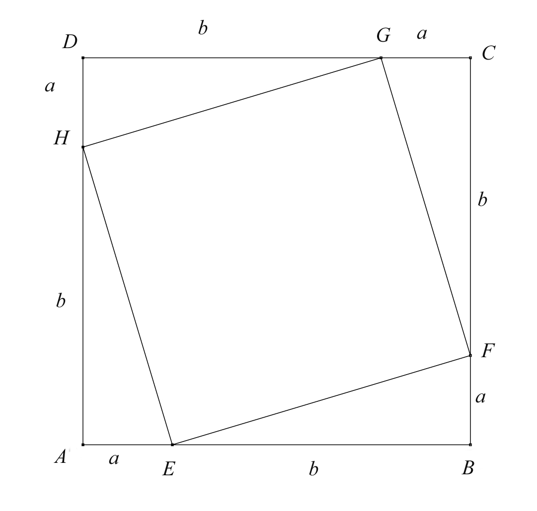 Pythagoraan lauseen todistus sisäkkäisin neliöin.